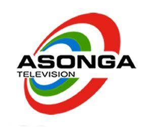 Logitypus tramitis televiifici Asonga Televisión